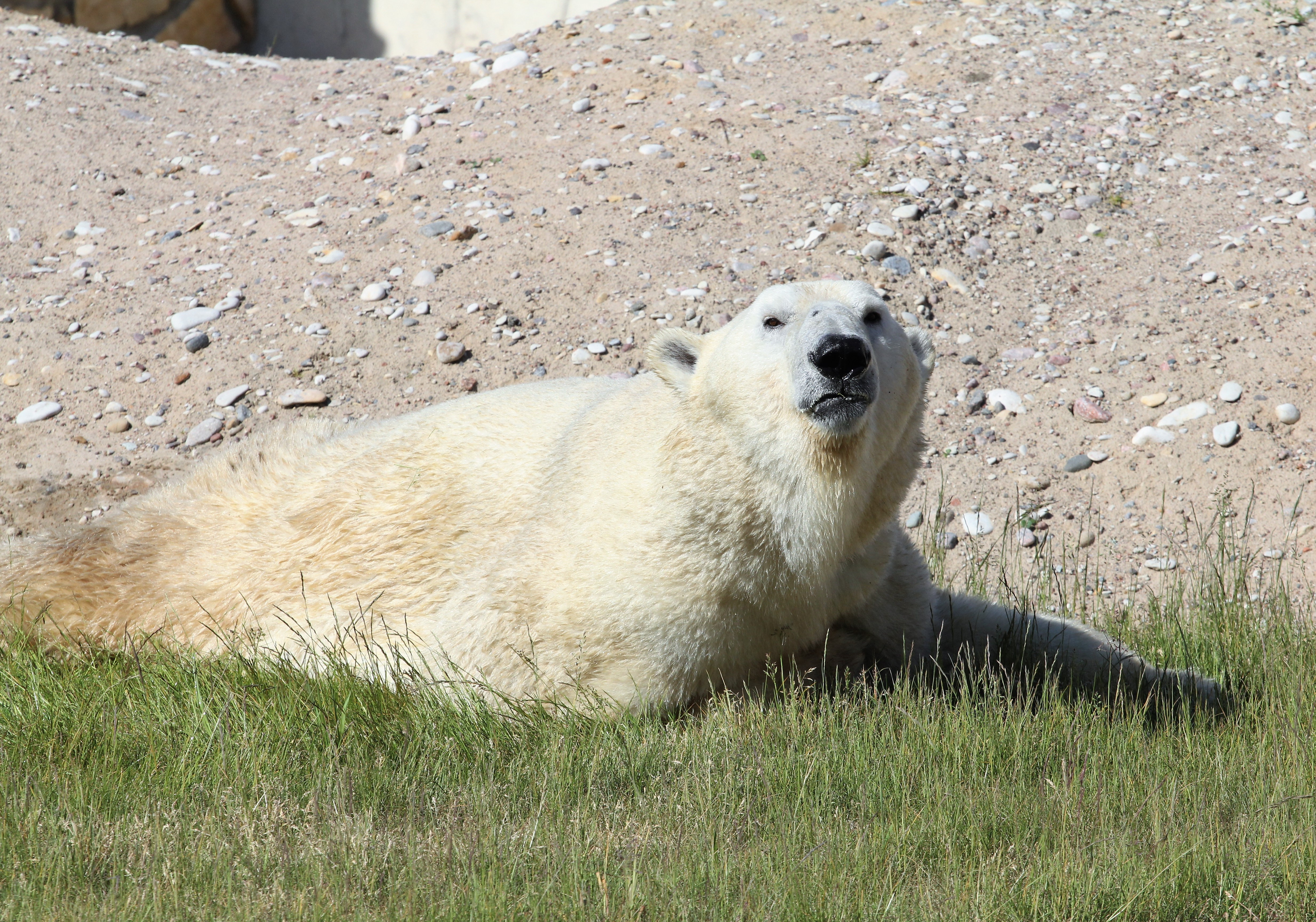 Tallinna Loomaaia jääkaru Nordi esimene päev uues polaariumis